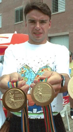 Dariusz Goździak, Arkadiusz Skrzypaszek, Maciej Czyżowicz. 1992 Summer Olympics.